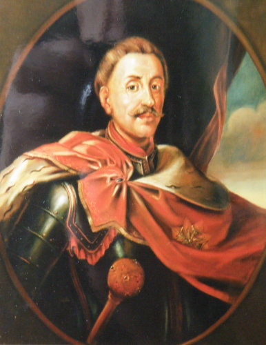 Великий короний гетьман - Станіслав Матвій Ревуський